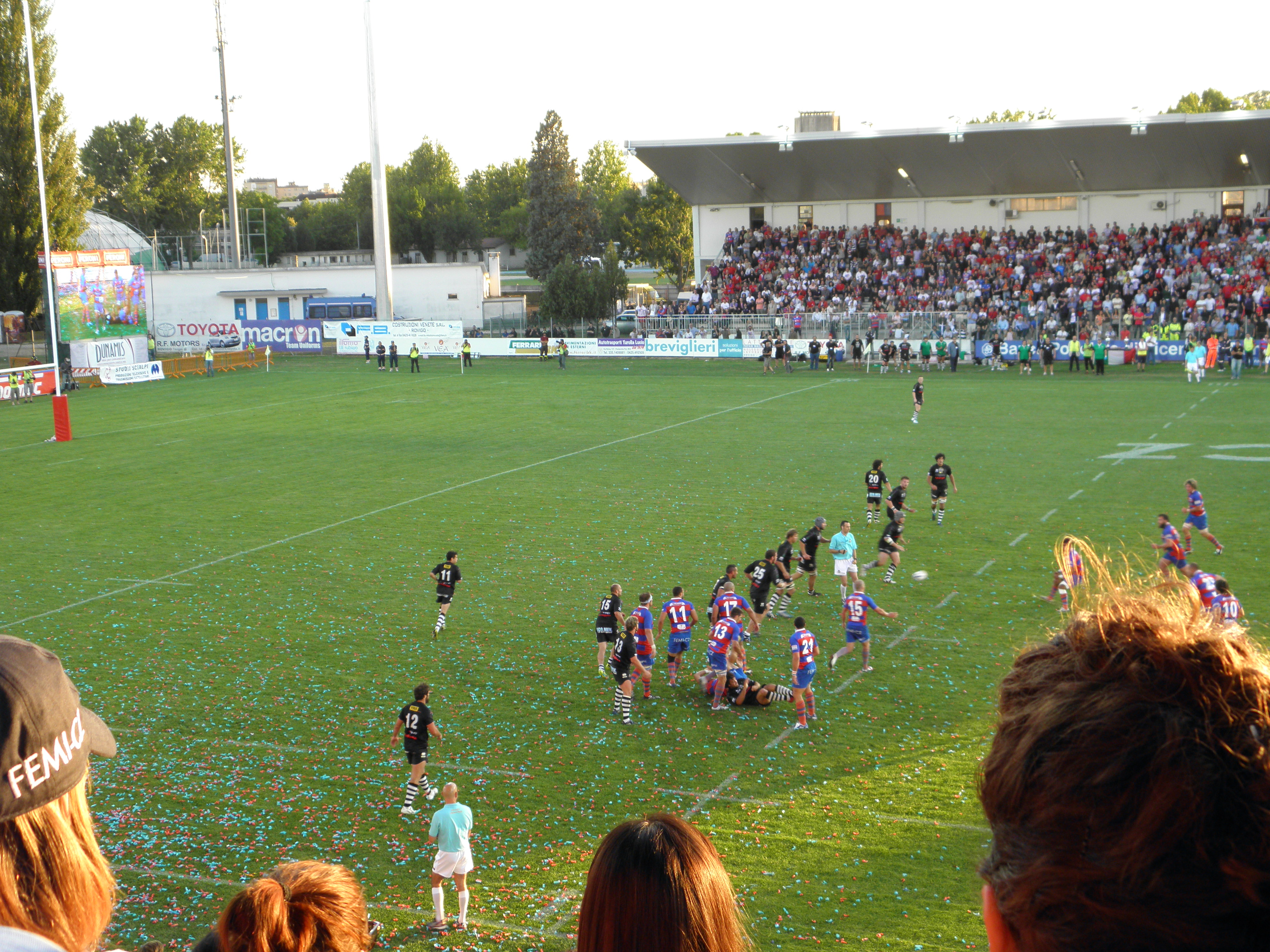 Rovigo, 28 maggio 2011: Campionato di Eccellenza di rugby a 15 2010-2011. Ore 20:08, azione di gioco.